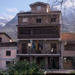 Ayuntamiento del concejo asturiano de Proaza